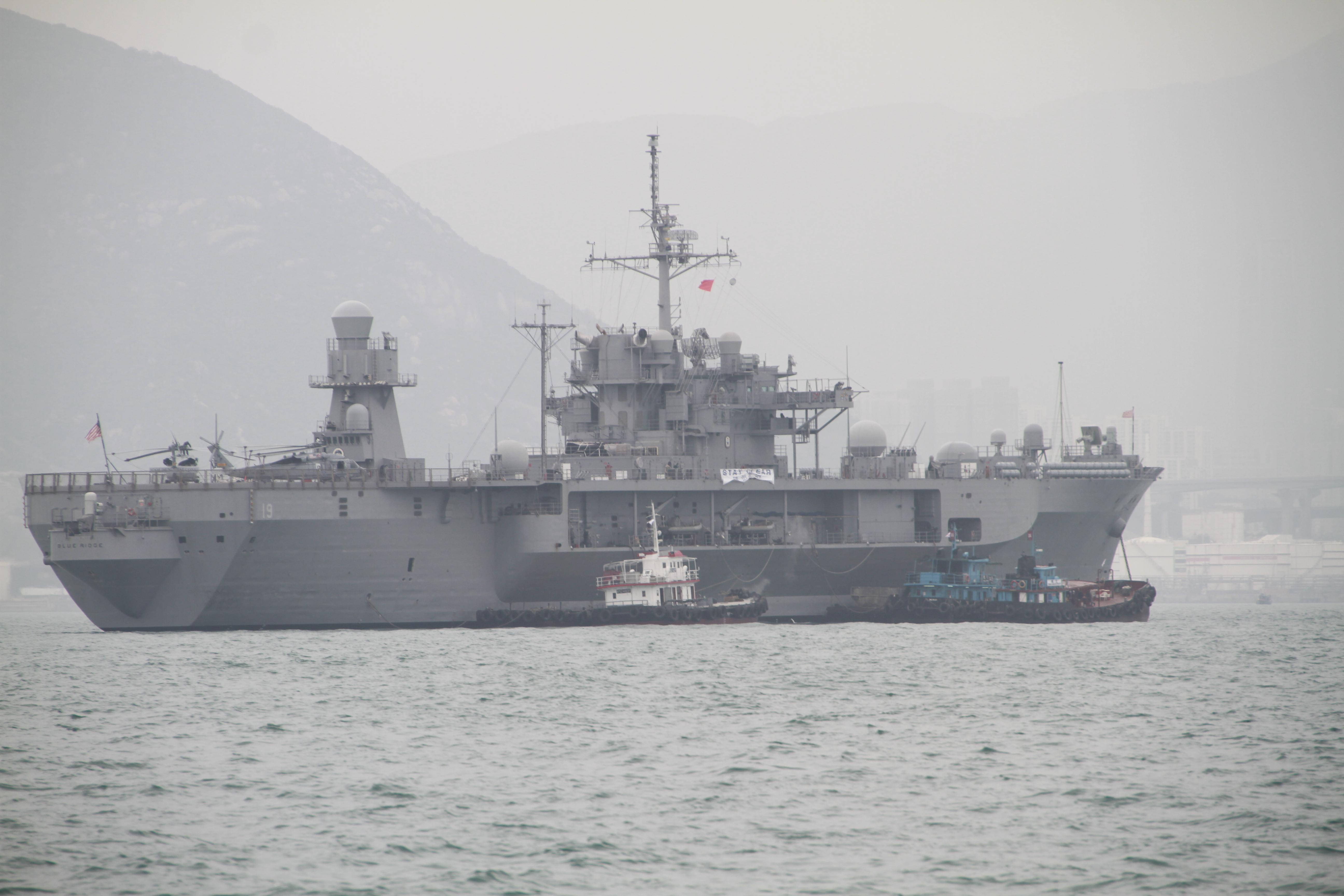 中文（香港）: 藍嶺號停泊於青衣對出海域(攝於15-03-2014)